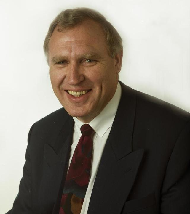 10.9.1991 Prof. Dr. Werner Münch, Ministerpräsident des Landes Sachsen-Anhalt